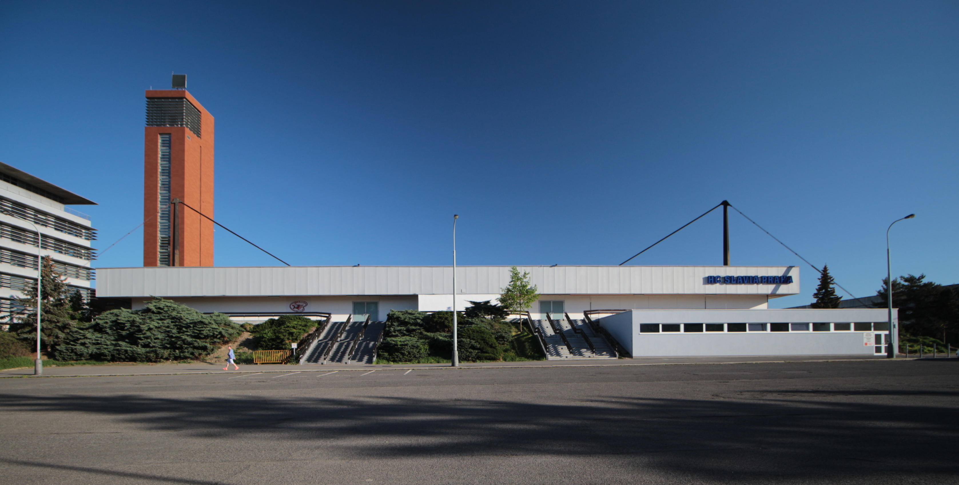 ASK Slavia Praha